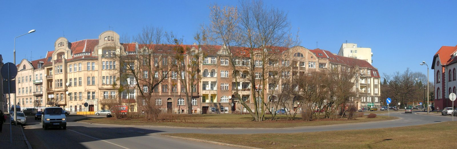 Plac Weyssenhoffa w Bydgoszczy